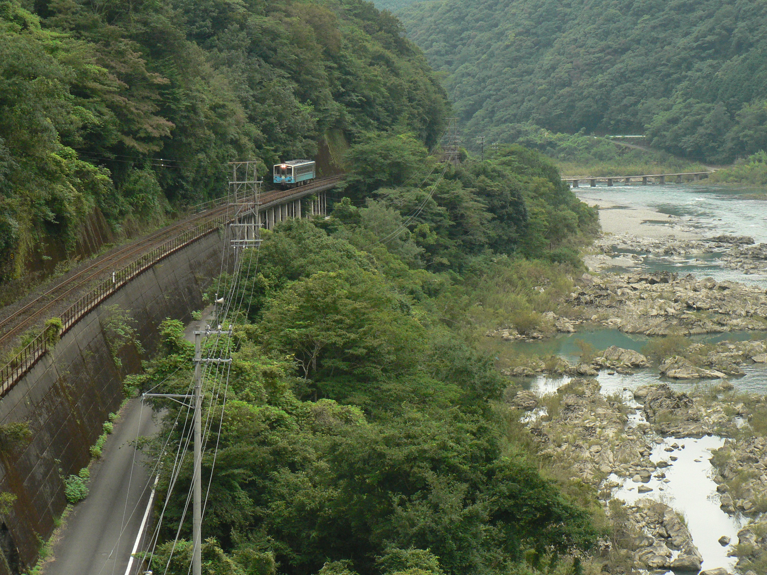 四万十川沿いに走る予土線。遠くに沈下橋を望む。2013年9月撮影